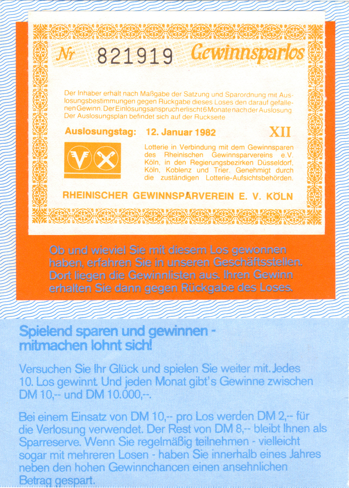 Gewinnsparlos Rheinischer Gewinnsparverein, 1982